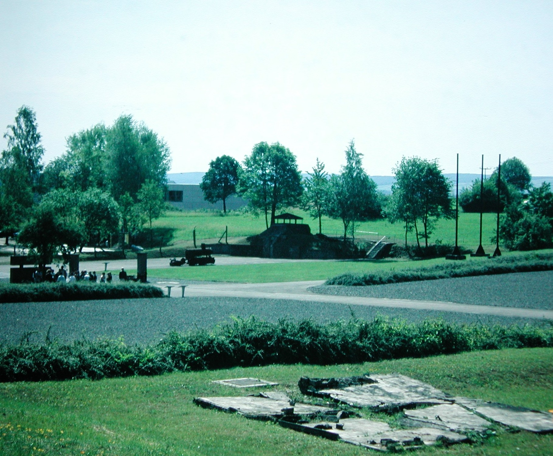 Gedeelte van het concentratiekamp Mittelbau Dora. Auteur P.H.Louw, eigen werk, vrij voor gebruik. Foto juli 2004